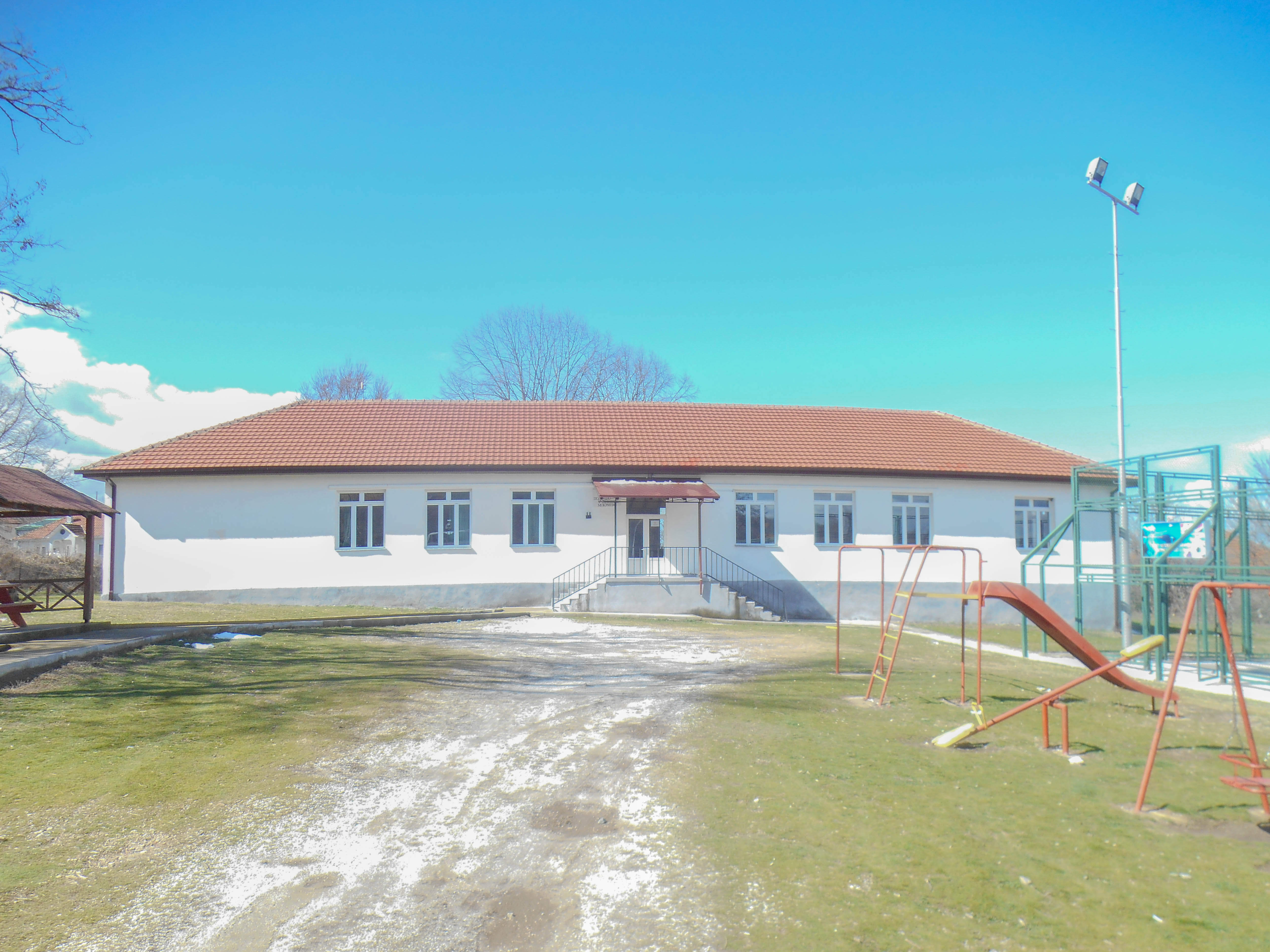 ОУ „Видое Подгорец“ - Мокриево